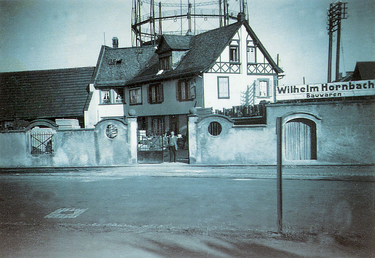 Bauwarenhandlung Wilhelm Hornbach, Landau